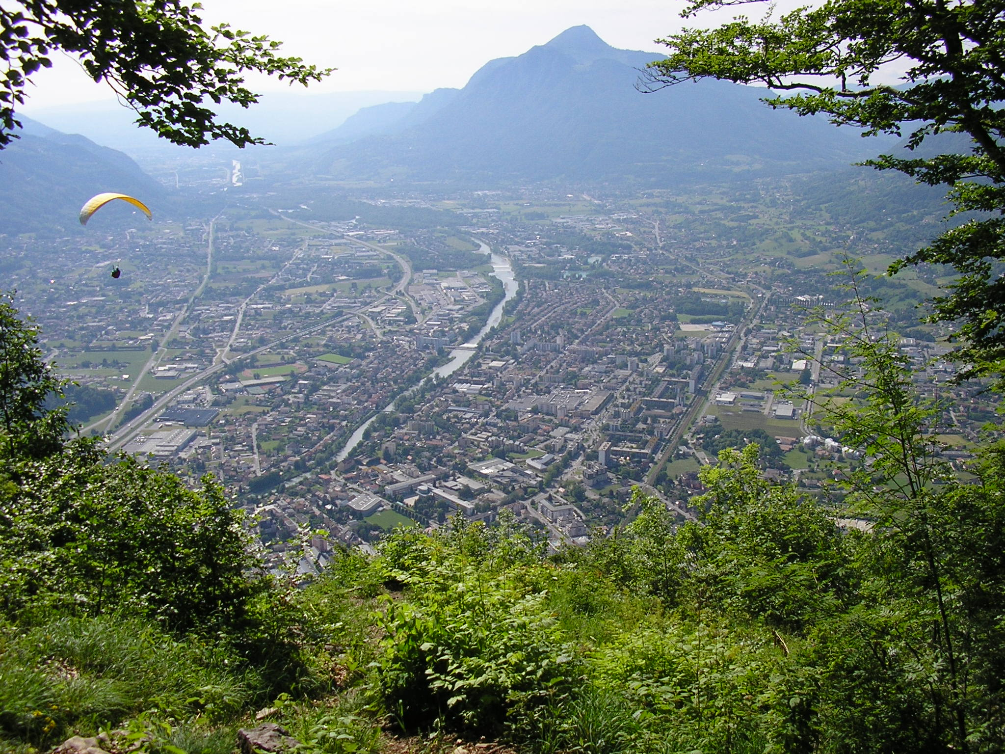 Vue de Cluses depuis la pointe de Chevran